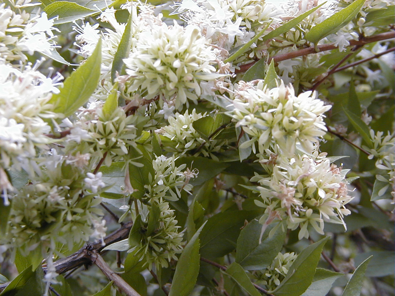 Abelia chinensis. Real Jardín Botánico de Madrid.